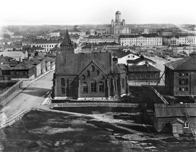 1867 . Panoraama Tähtitieteellisestä observatoriosta Ulriikaporinvuorelta ( Tähtitorninvuorelta) pohjoiseen. Vasemmalla Unioninkatu, keskellä Saksalainen kirkko, oikealla Eteläsatama, Pakkahuoneenlaituri. Taustalla Pohjoisesplanadi 17-7.